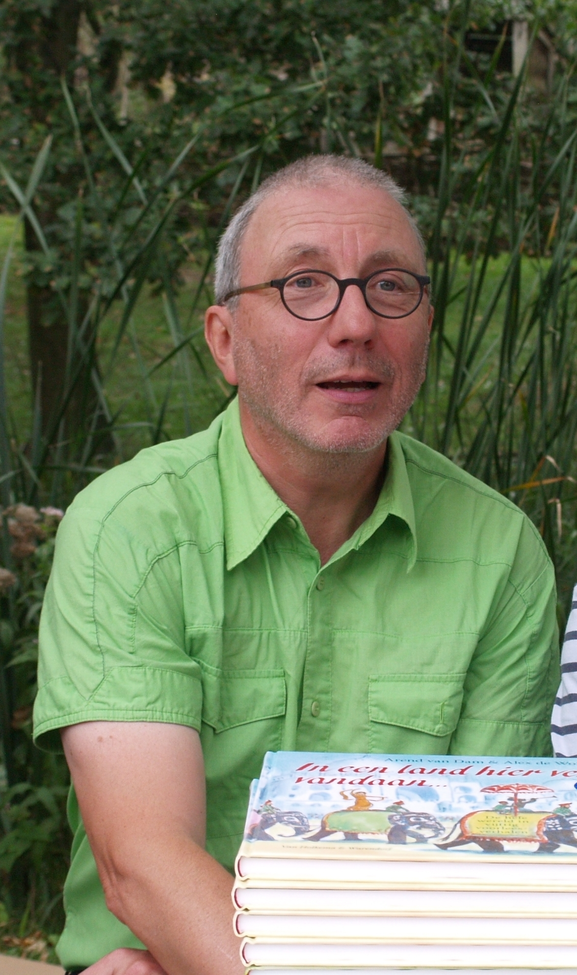 Arend van Dam